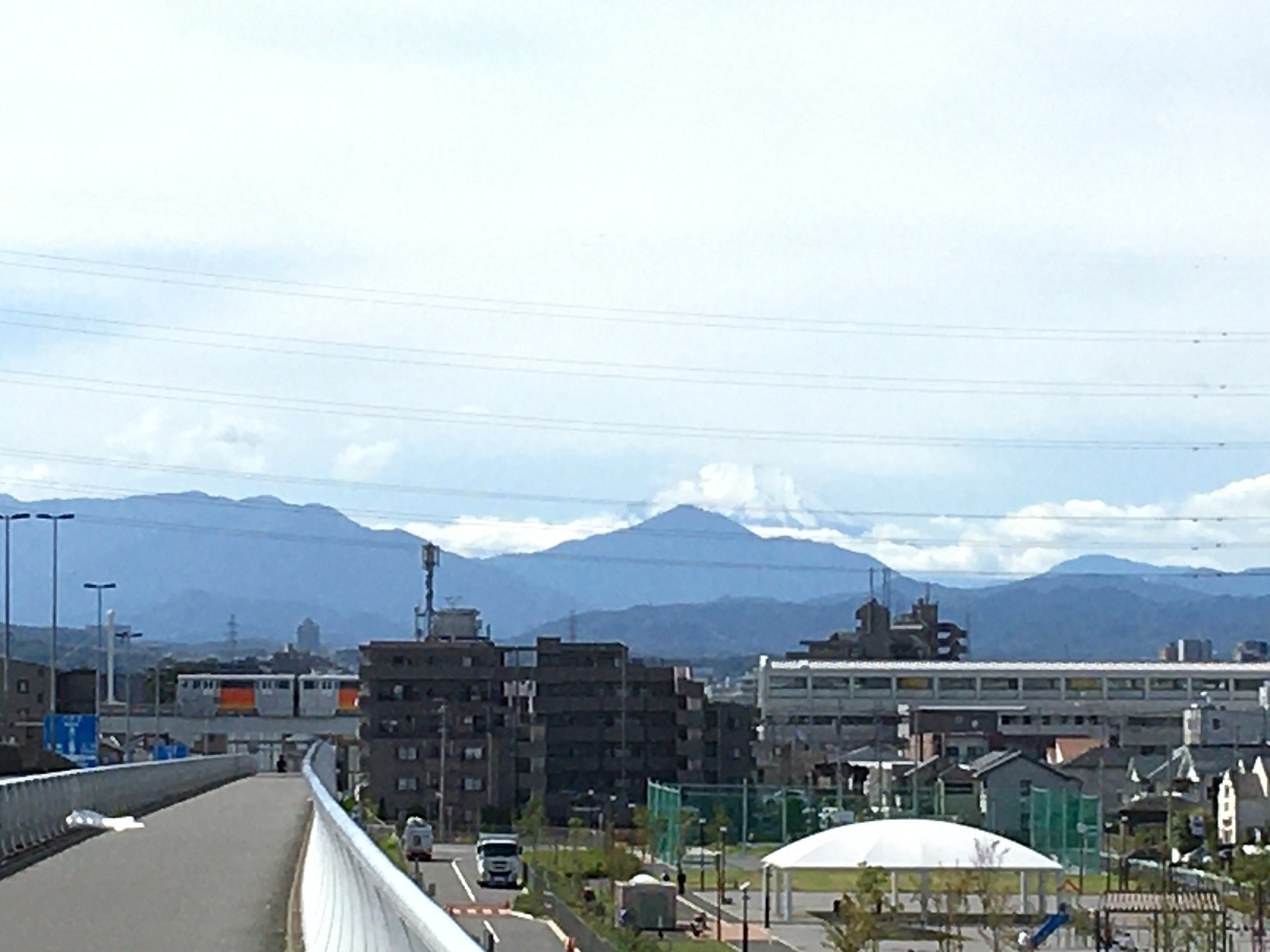 富士山をバックに万願寺駅を出発した多摩モノレール